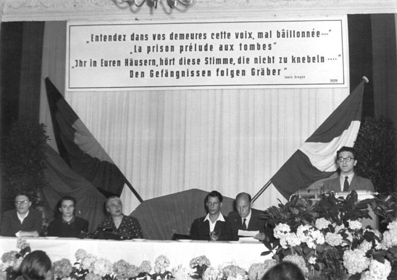 Zentralbild-Köhler 19.6.52 Protestkundgebung für André Stil. Am Donnerstag, dem 19. Juni 1952, um 19 Uhr veranstaltete der Deutsche Schriftstellerverband im Klubhaus der Kulturschaffenden, Berlin W8, Jägerstrasse 2, eine Kundgebung für den eingekerkerten französischen Schriftsteller, Stalinfriedenspreisträger Andre' Stil. UBz: Blick auf das Präsidium. V.li.n.re.: Kuba, Frau Stern, Mitautorin des Films "Das verurteilte Dorf", Anna Seghers, Stephan Hermlin, Ludwig Renn. Ganz rechts Henryk Keisch bei seiner Ansprache.